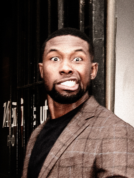 Toronto International Film Festival 2016